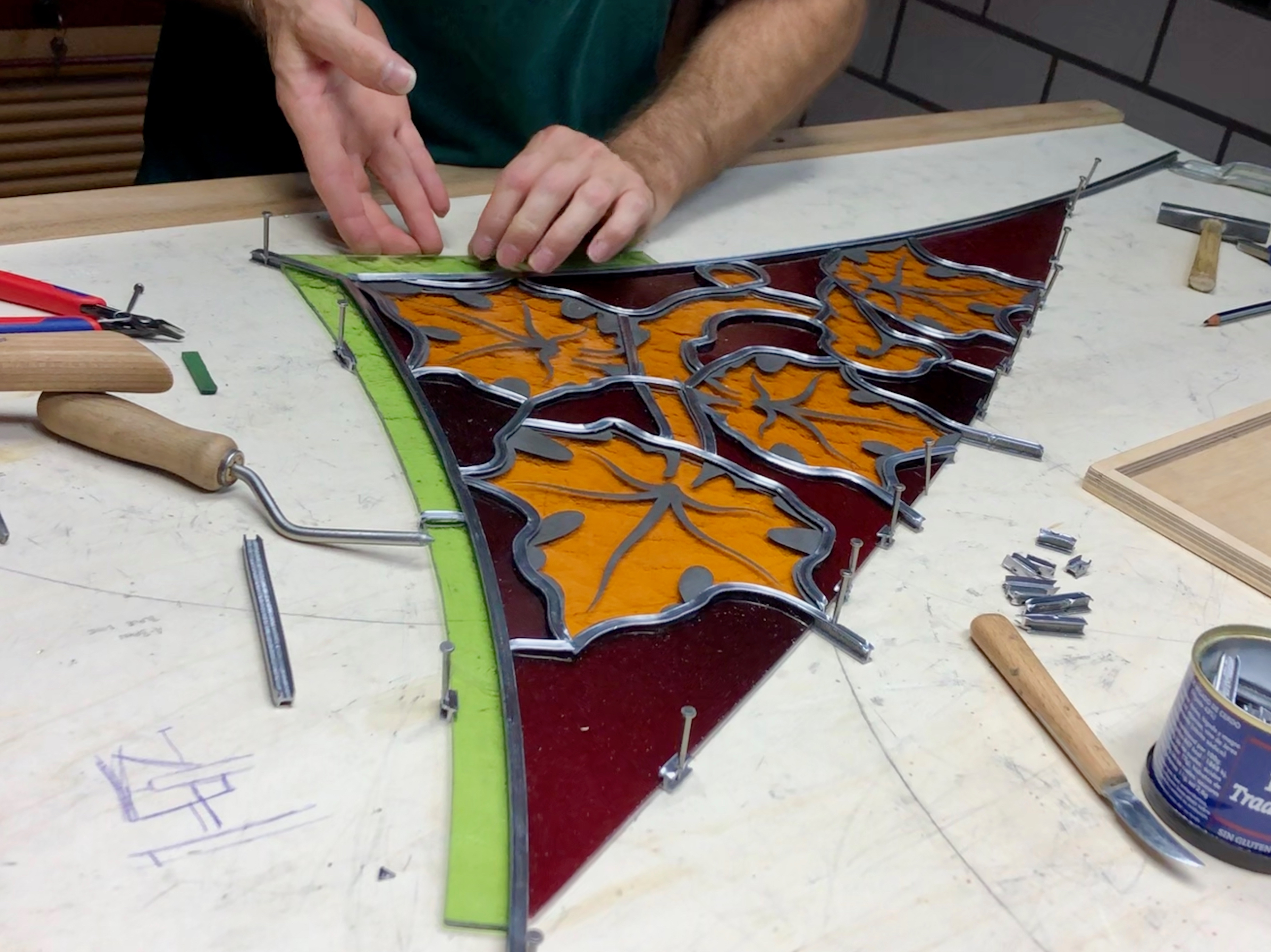 Seit 2003 arbeitet die Bauhütte daran, die teilweise stark beschädigten und teilweise ganz zerstörten Fenster des Welter-Zyklus zu rekonstruieren. Dazu werden die Glasstücke anhand der originalen Schablonen aus dem 19. Jahrhundert in Form geschnitten, bemalt, gebrannt und mit H-förmigen Bleiruten eingefasst. Dieser Arbeitsschritt ist hier dokumentiert.